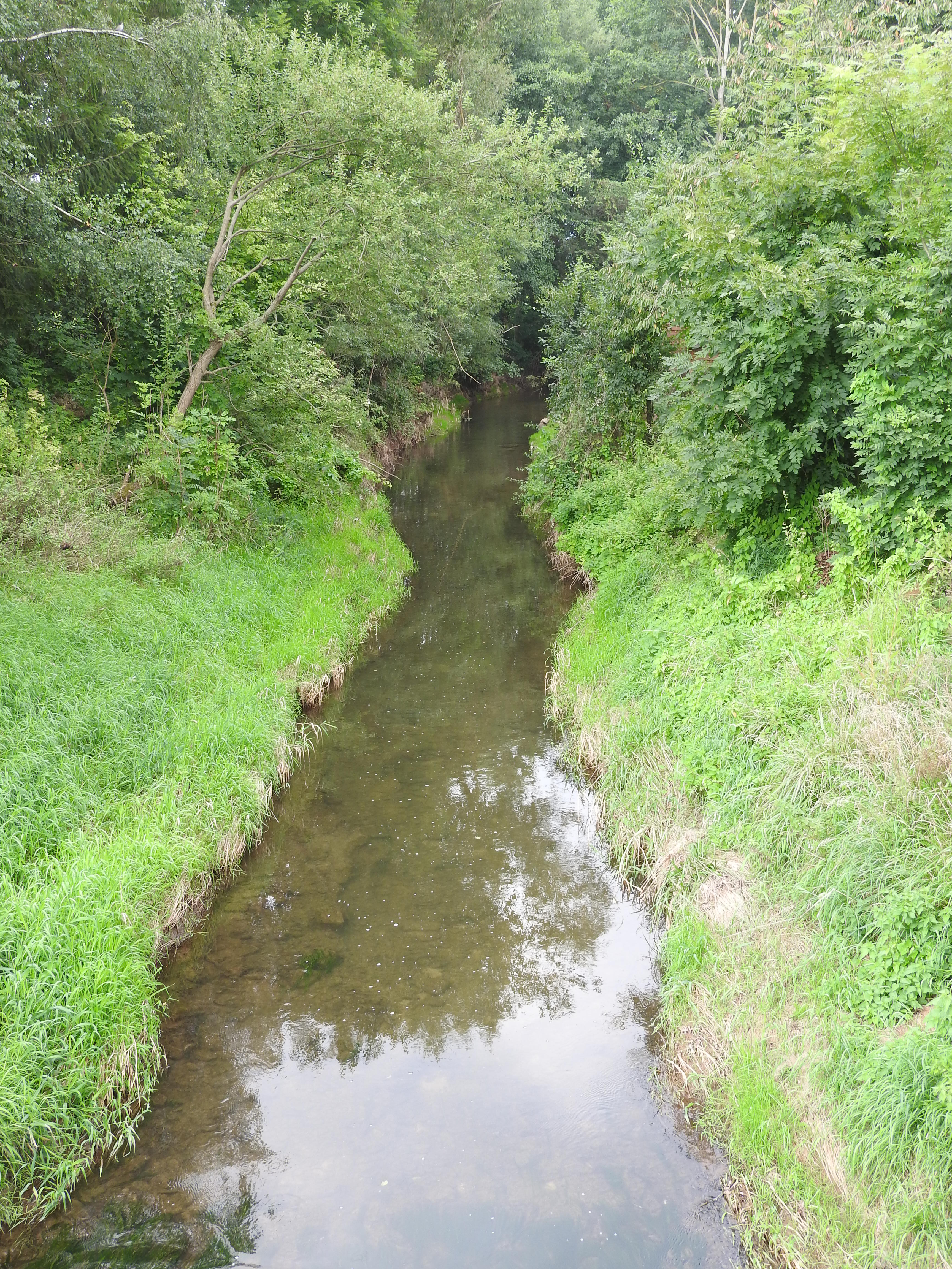 Bode in Kleinbodungen, Thüringen